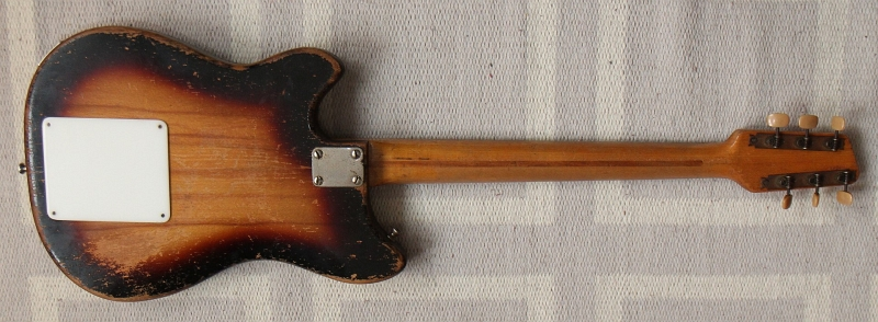 Parte trasera de una Resonet Futurama, se aprecia la tapa de la palanca de tremolo y apoya cuerdas, y se ve que es una guitarra en two tone sunburst.